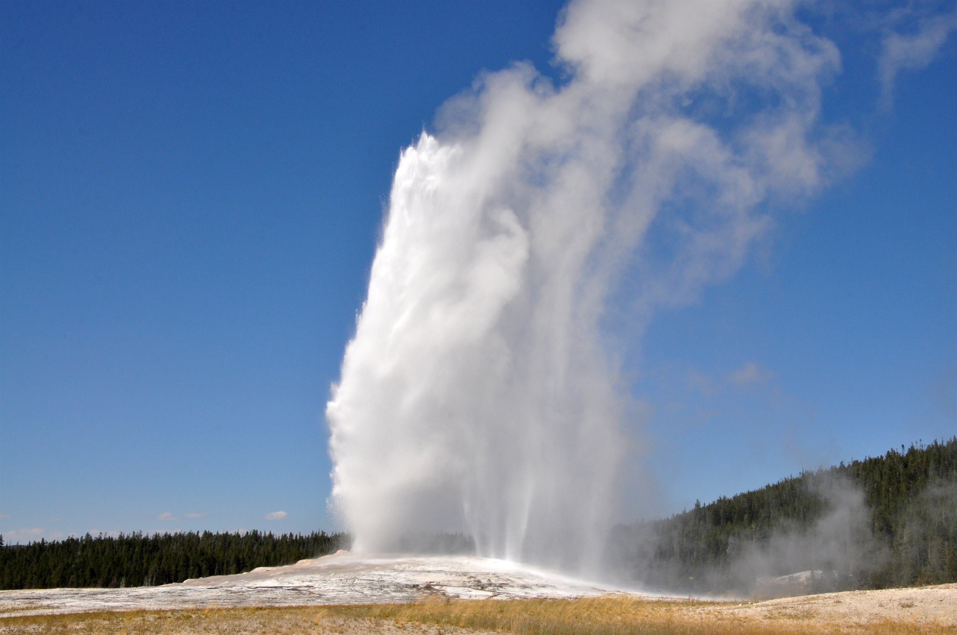 Aggiunta una nuova foto del Old Faithful Geyser (Vecchio geyser fedele)